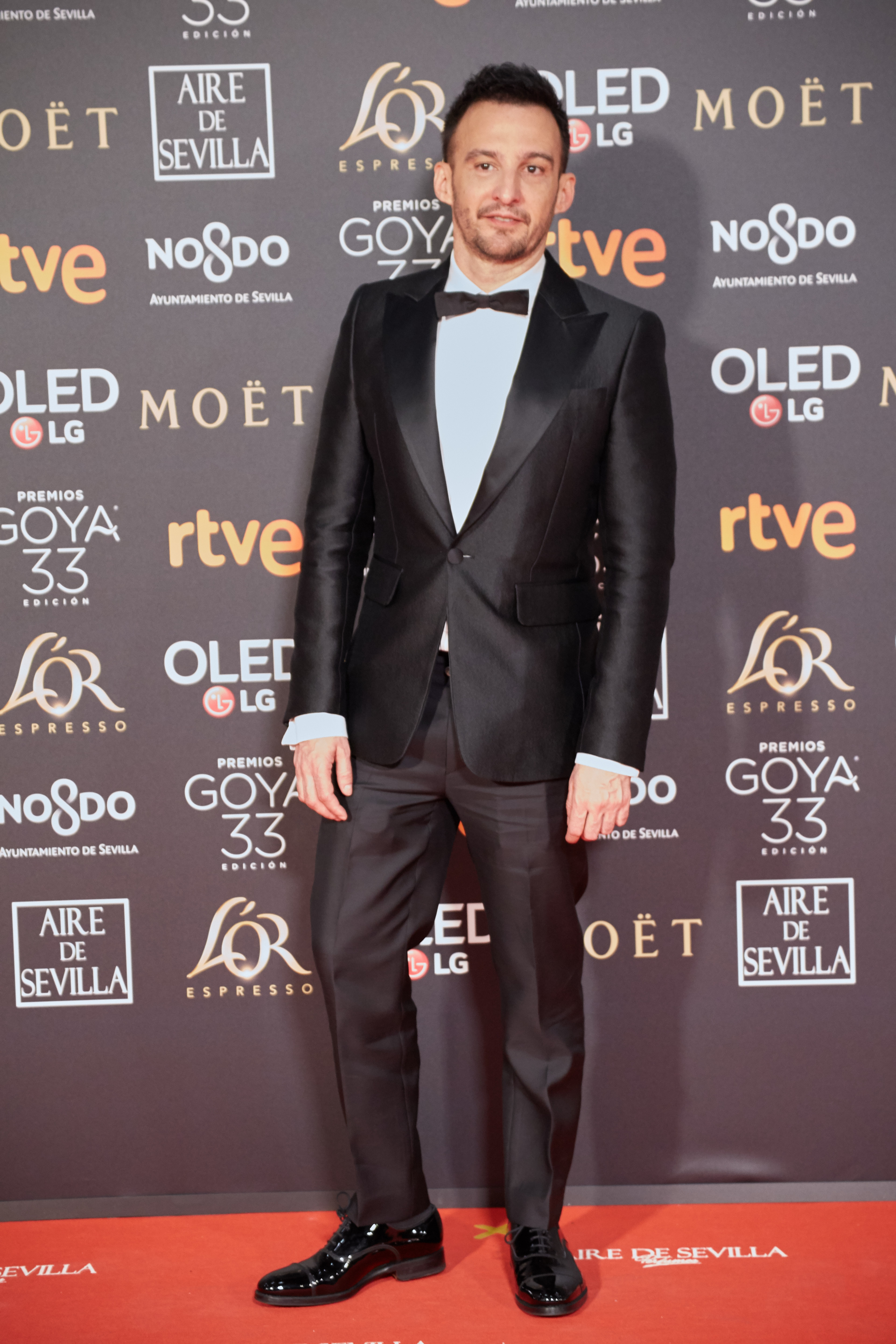 Alejandor Amenabar en la alfombra roja de los Premios Goya celebrados en Sevilla en Febrero 2019